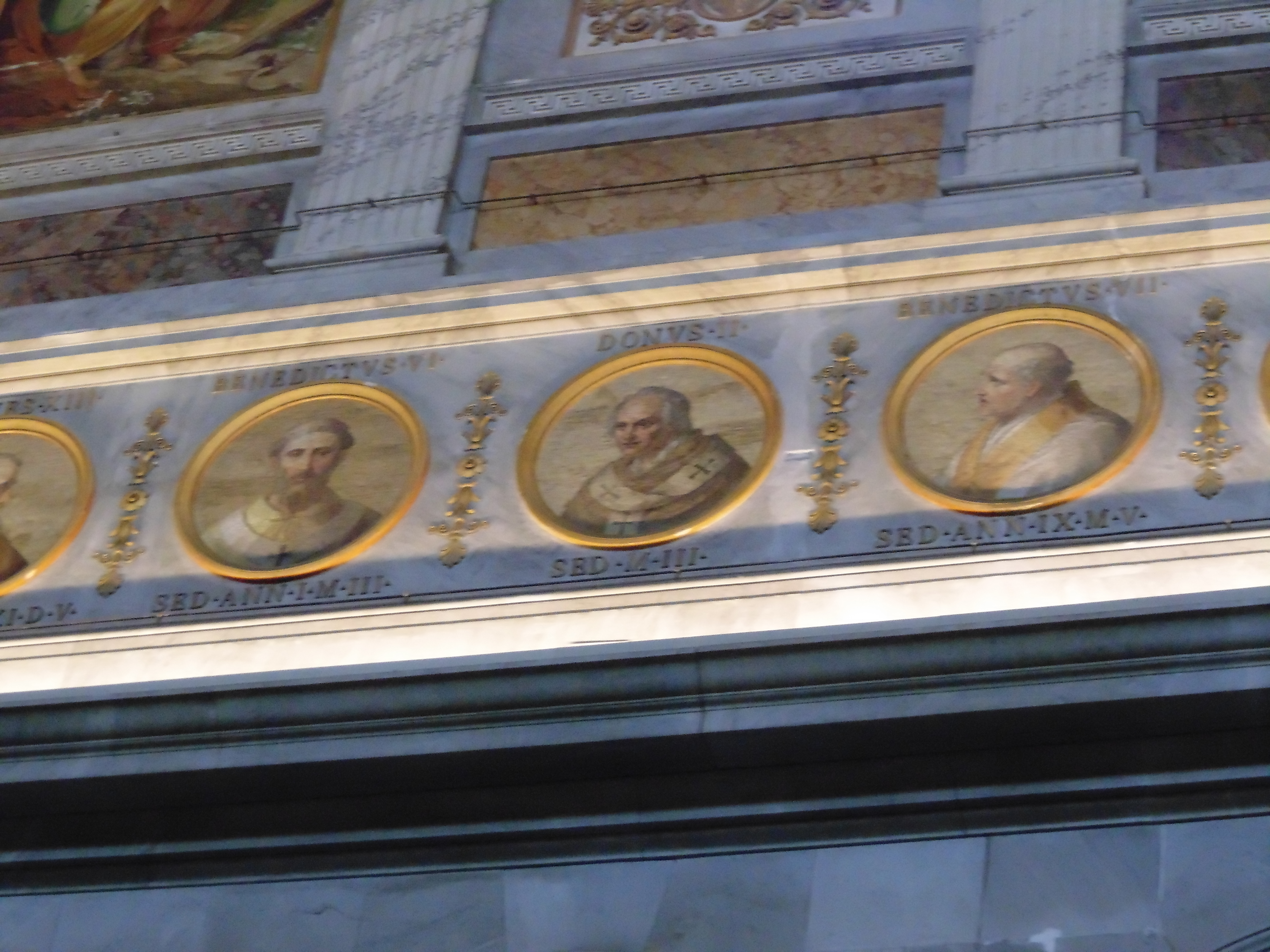 Lunetos de Benedicto VI, Dono II y Benedicto VII en la Basílica de San Pablo Extramuros.